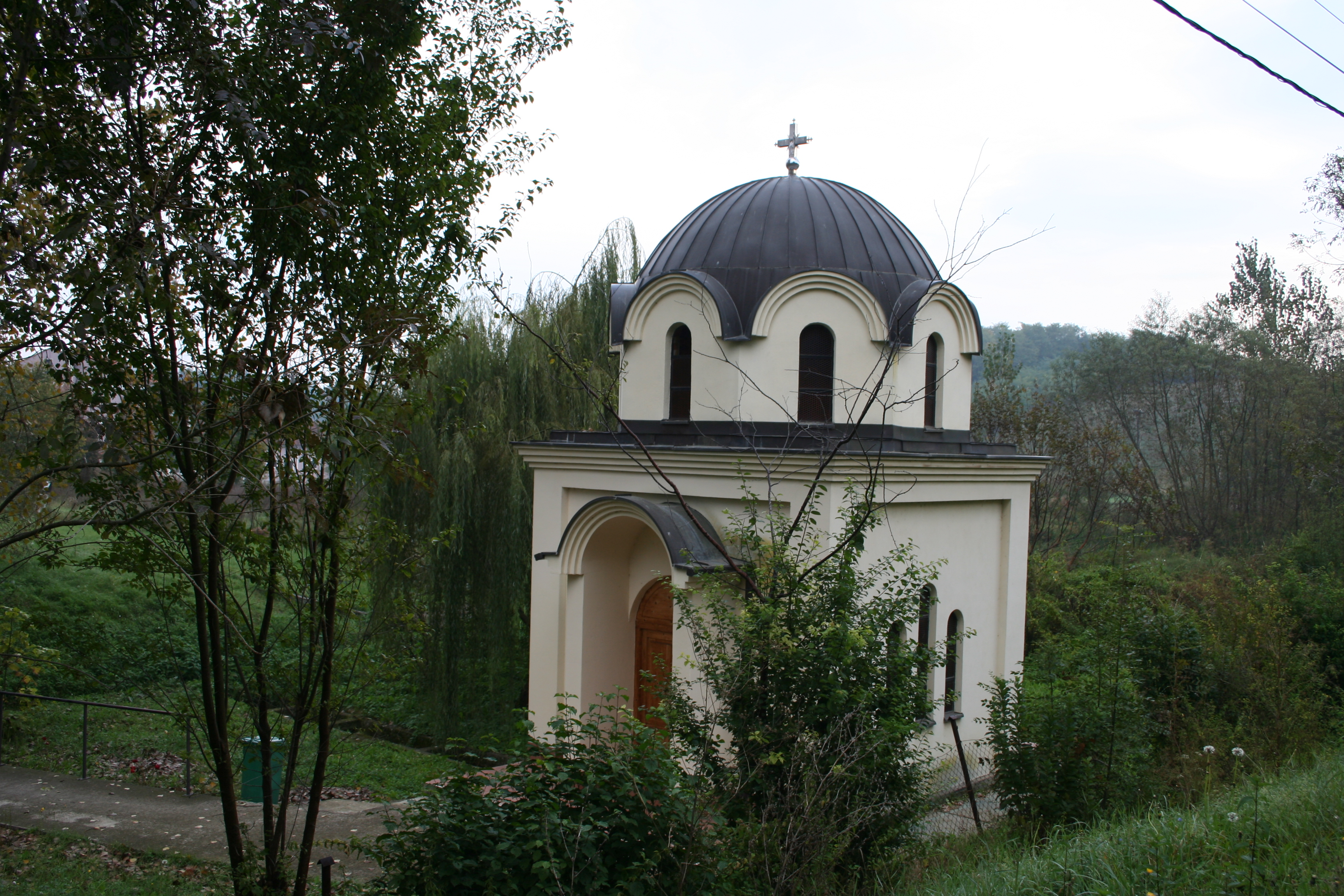 Manastir Grabovac